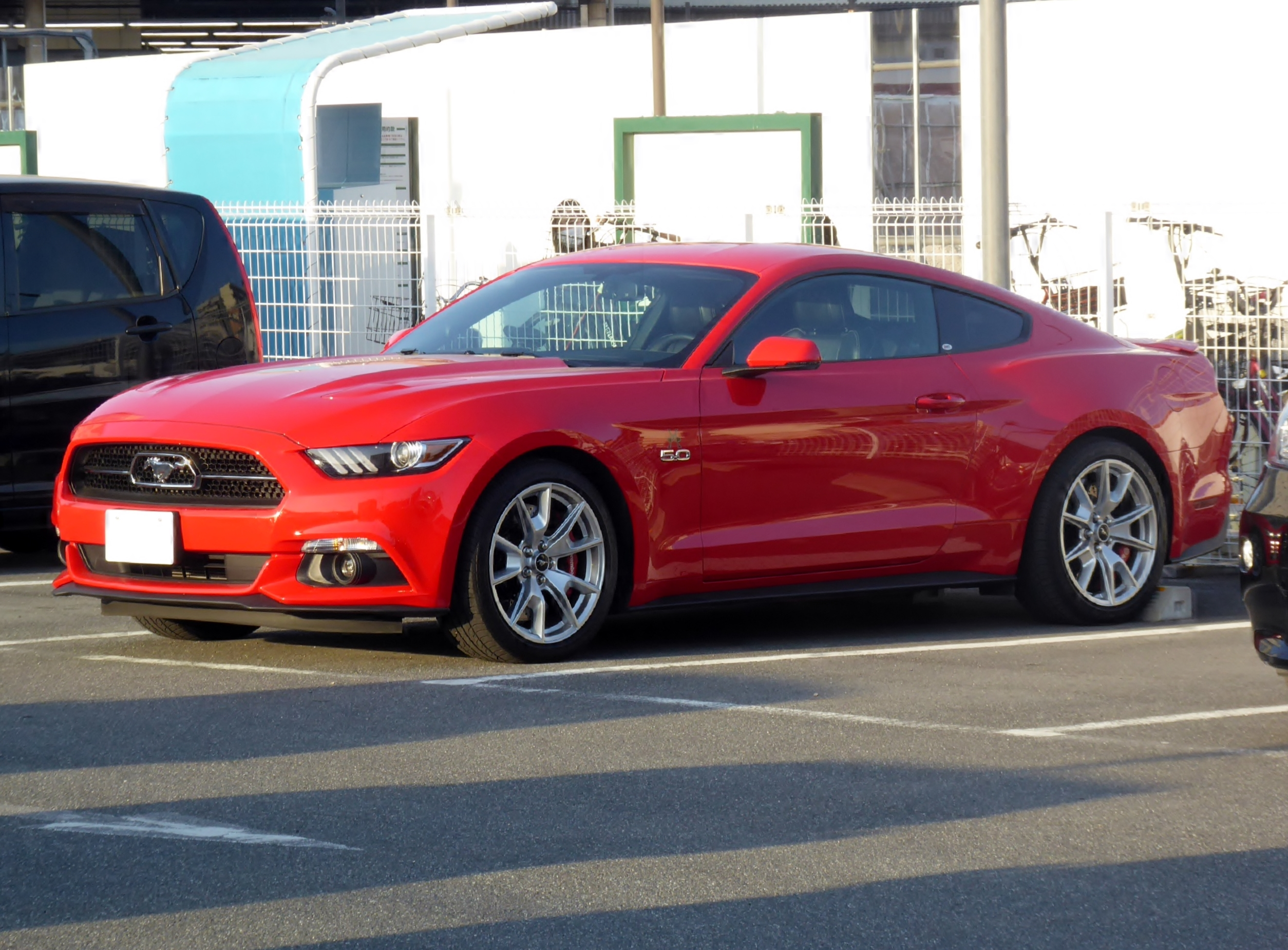 S550系フォード・マスタングGT 50 Year Limited Editionを撮影。